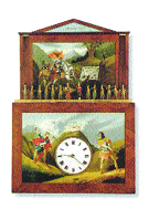 Eine Flötenuhr. Häufig wurden die Uhren auch mit Musikwerken gekoppelt, die mit Flöten, Harfen oder Glasglockenspielen besetzt waren und im Stundentakt verschiedene Melodien spielen konnten. Große Spieluhren (ganze Automaten) wurden meist auf Bestellung gefertigt und fanden bei so mancher Weltausstellung Beachtung.